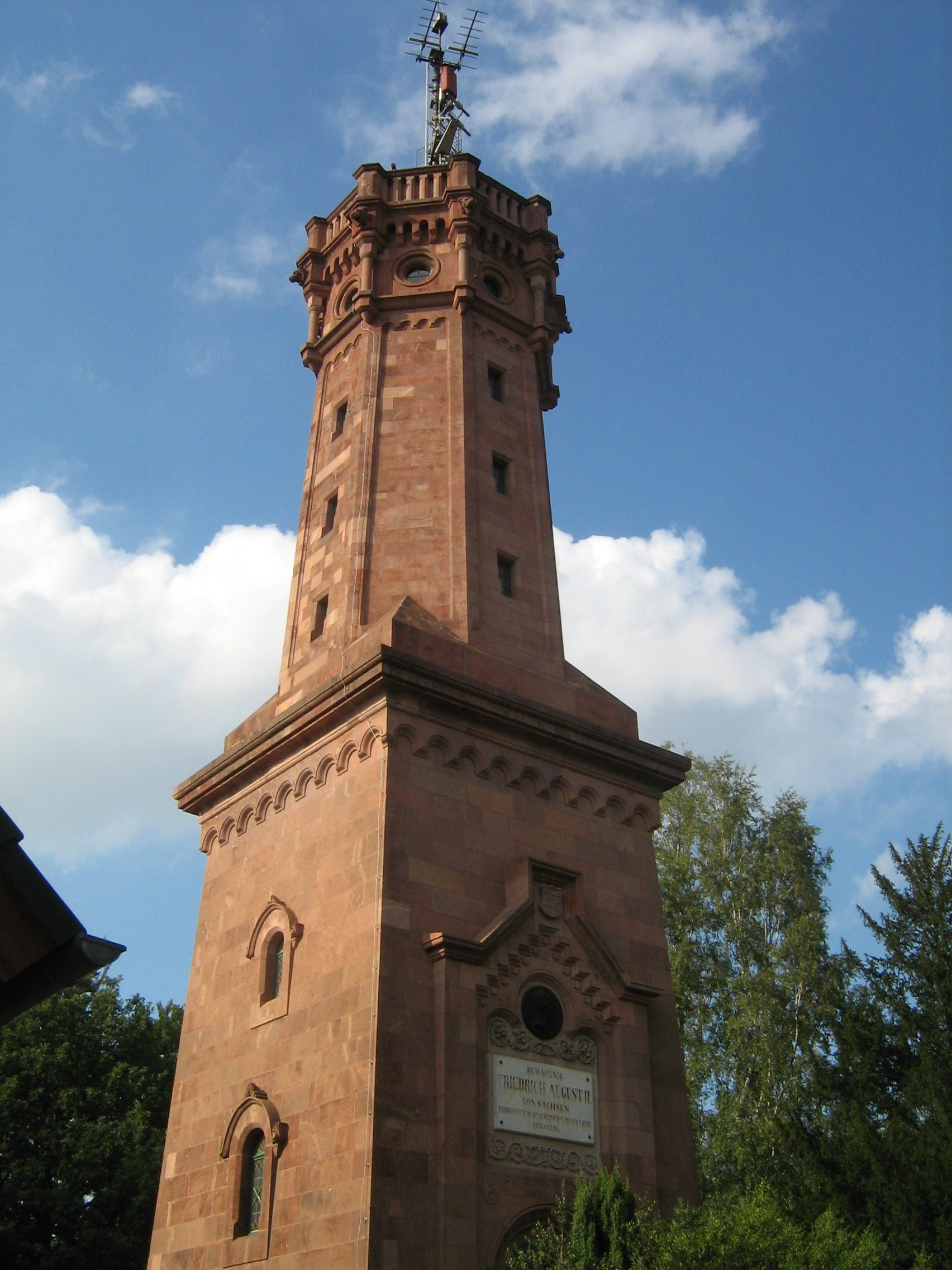 The Tower Friedrich August Turm on mountain of Rochlitz, Der Friedrich-August-Turm am Rochlitzer Berg